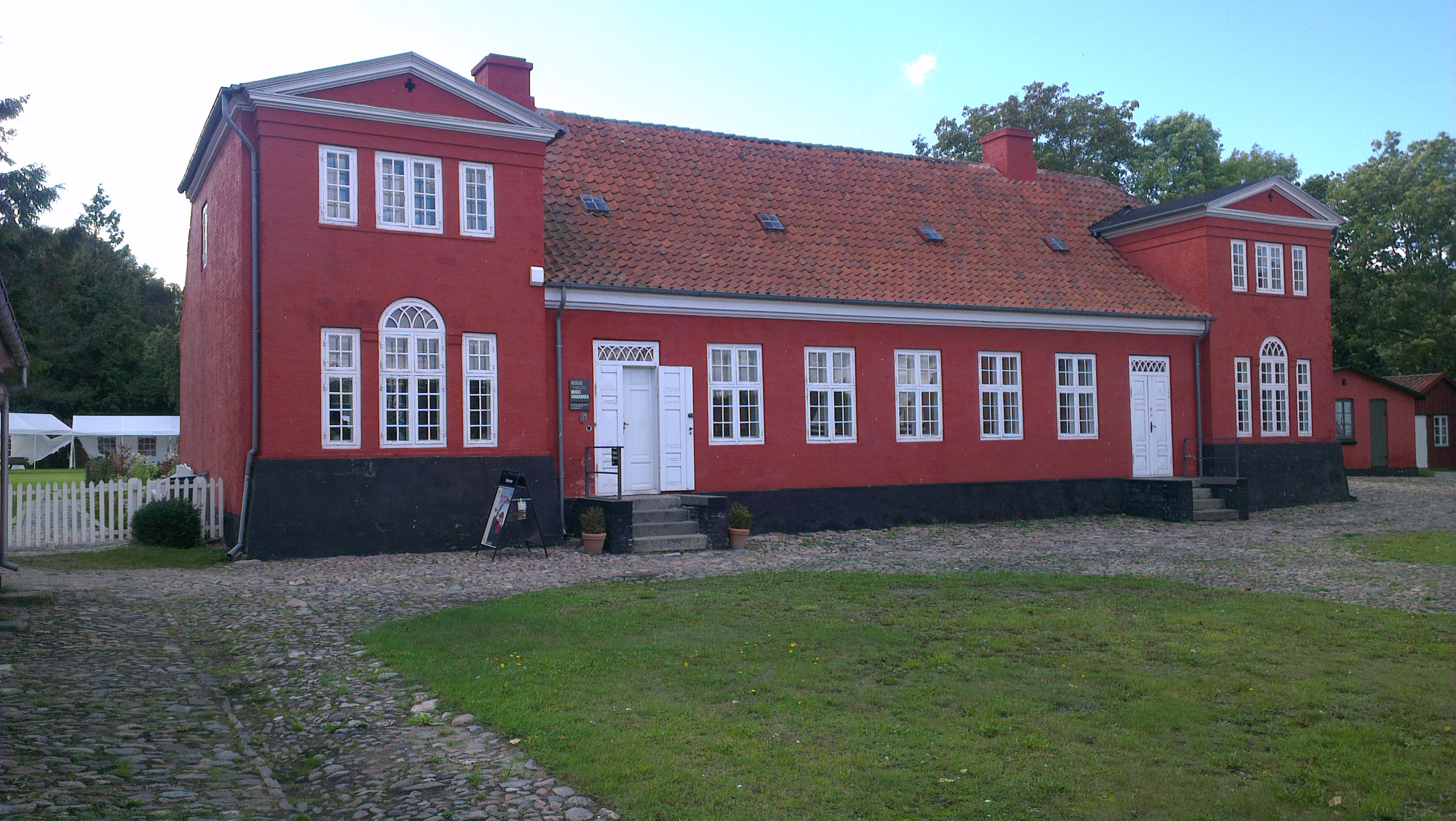 Jægerspris Færgegård. Billedet er taget mod vest. Stedet rummer i dag Frederikssund Museum, Færgegården.